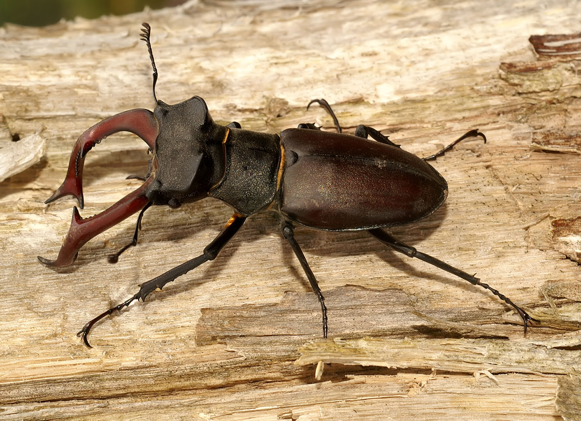 Lucanus cervus male